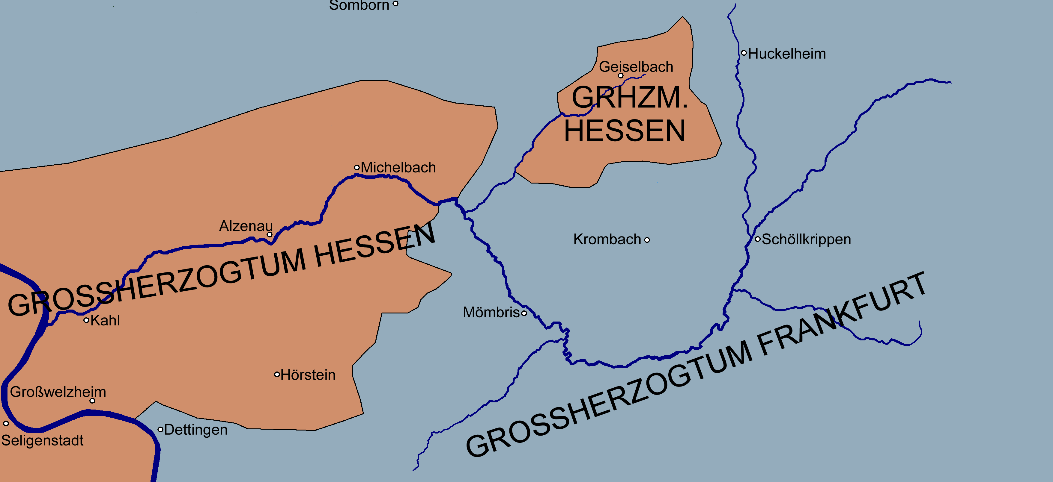 Die politische Zugehörigkeit des Kahlgrundes um 1810. Der Grenzverlauf der historischen Territorien kann stark abweichend dargestellt sein. Die Zugehörigkeit einiger Dörfer konnte nicht exakt nachgewiesen werden. Die Ortsnamen wurden in ihrer heutigen Namensform eingetragen.